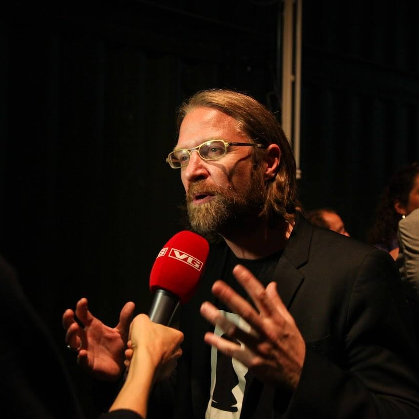 Iepe Rubingh im INterveiw mit der norwegischen Presse Verdens Gang